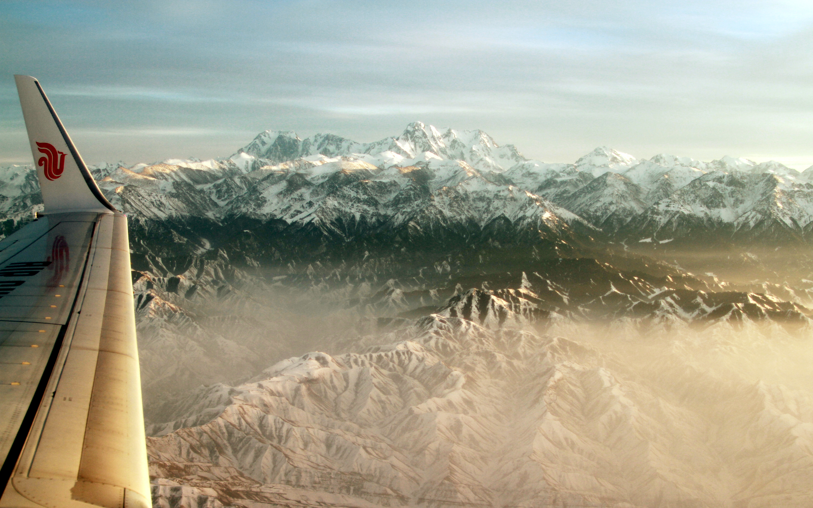 国航班机上拍摄的博格达峰